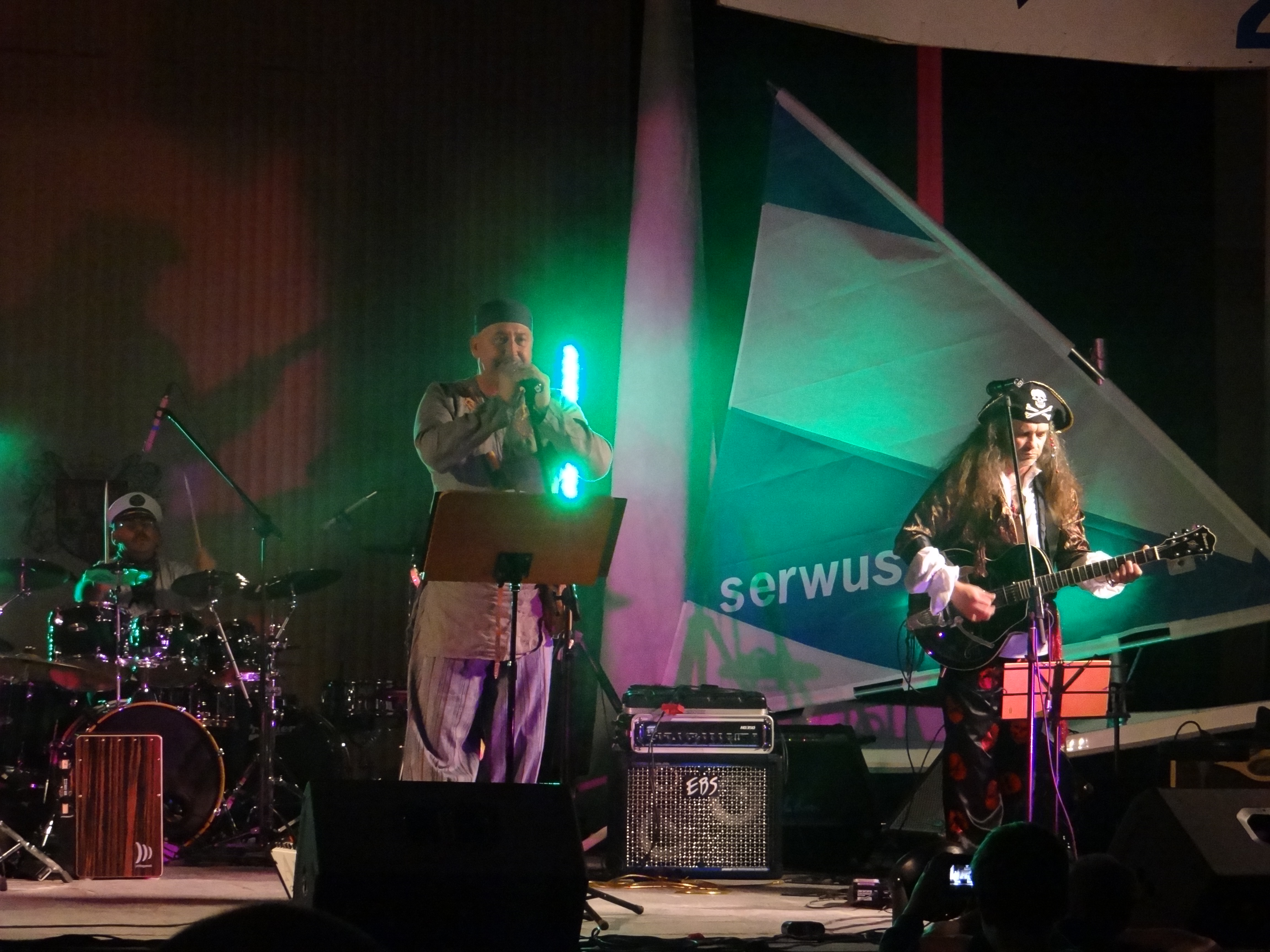 Rafa 2014 - występ laureatów (sala koncertowa Urzędu Wojewódzkiego w Radomiu)